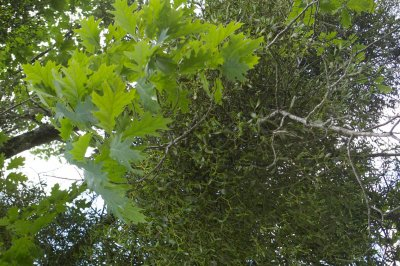 Uchelwydd Viscum album yn tyfu ar dderwen yn Ffrainc, Gorffennaf 2008 (Compare fabled druidic oak mistletoe on Anglesey)